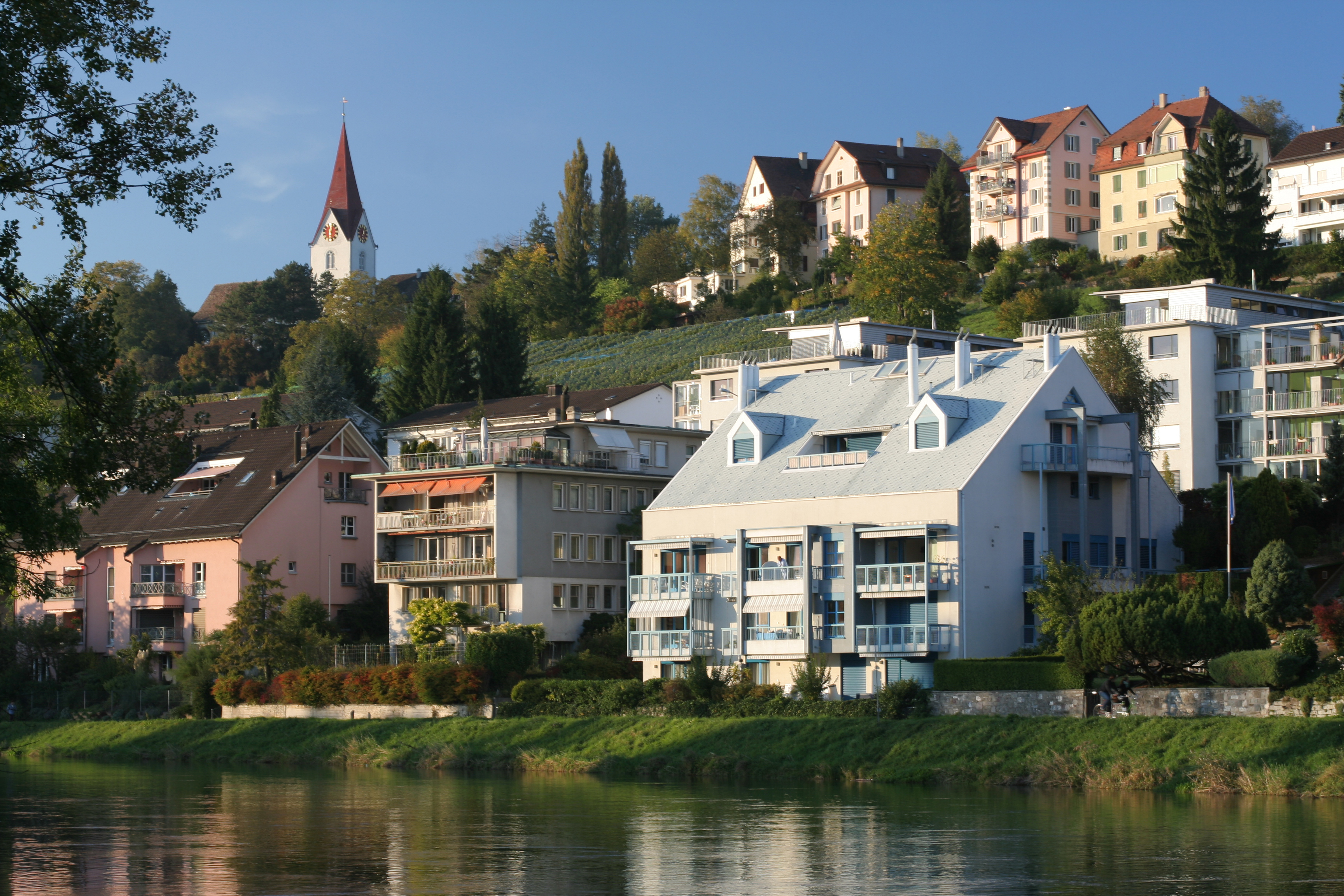 Limmat mit dem Quartier Höngg in Zürich, Schweiz